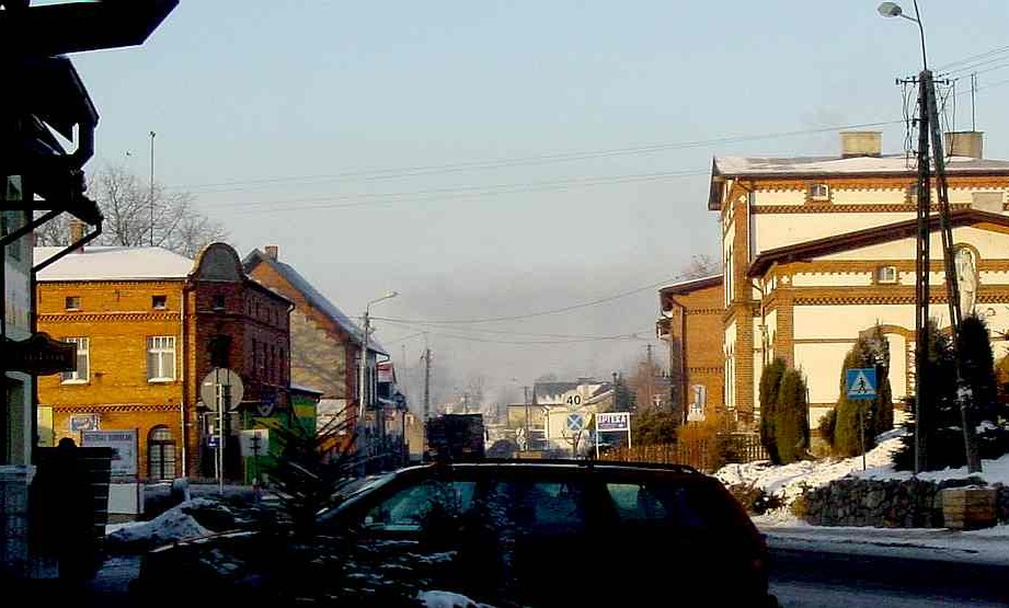 Stara Kiszewa - zima 2003 - Stako